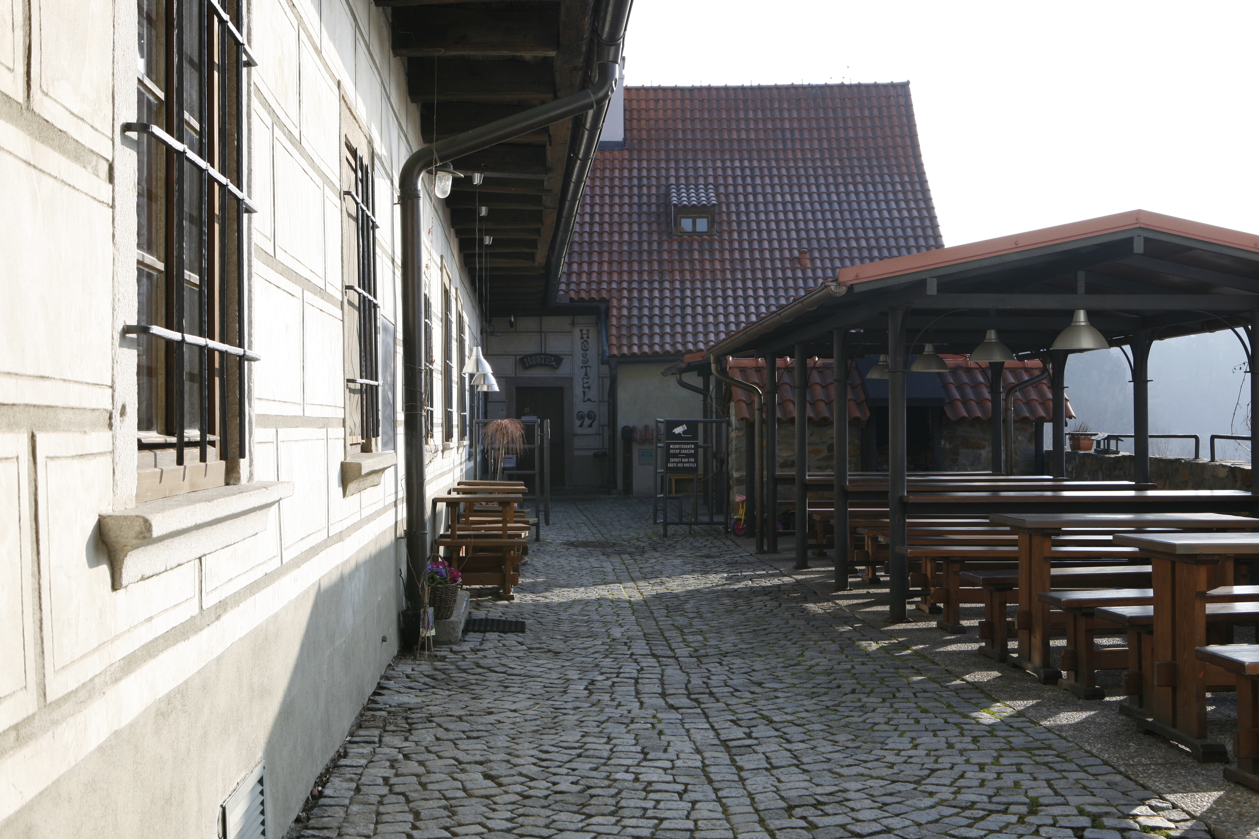 Terasa - Věžní 99, Český Krumlov